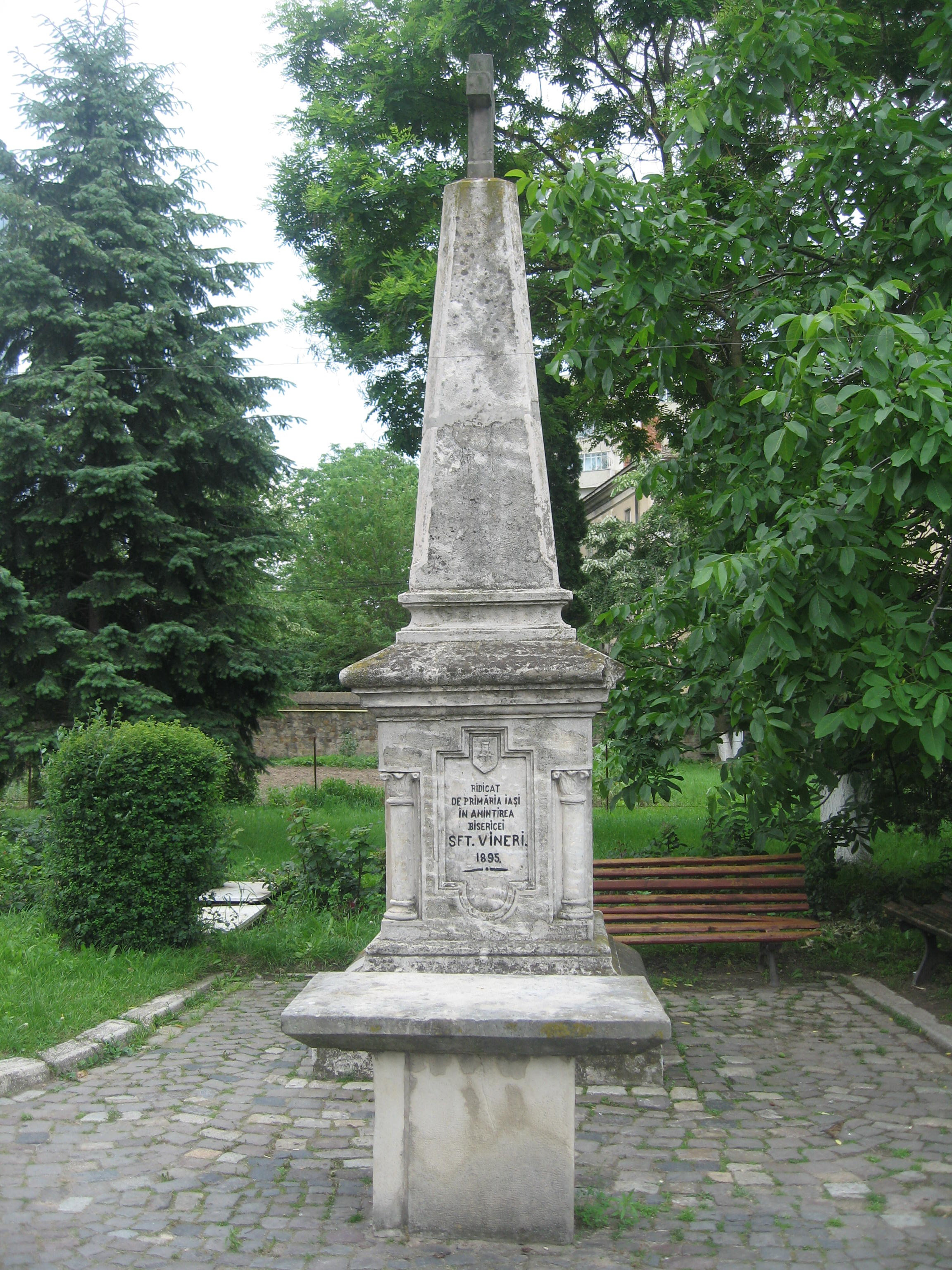 Biserica Bărboi din Iași